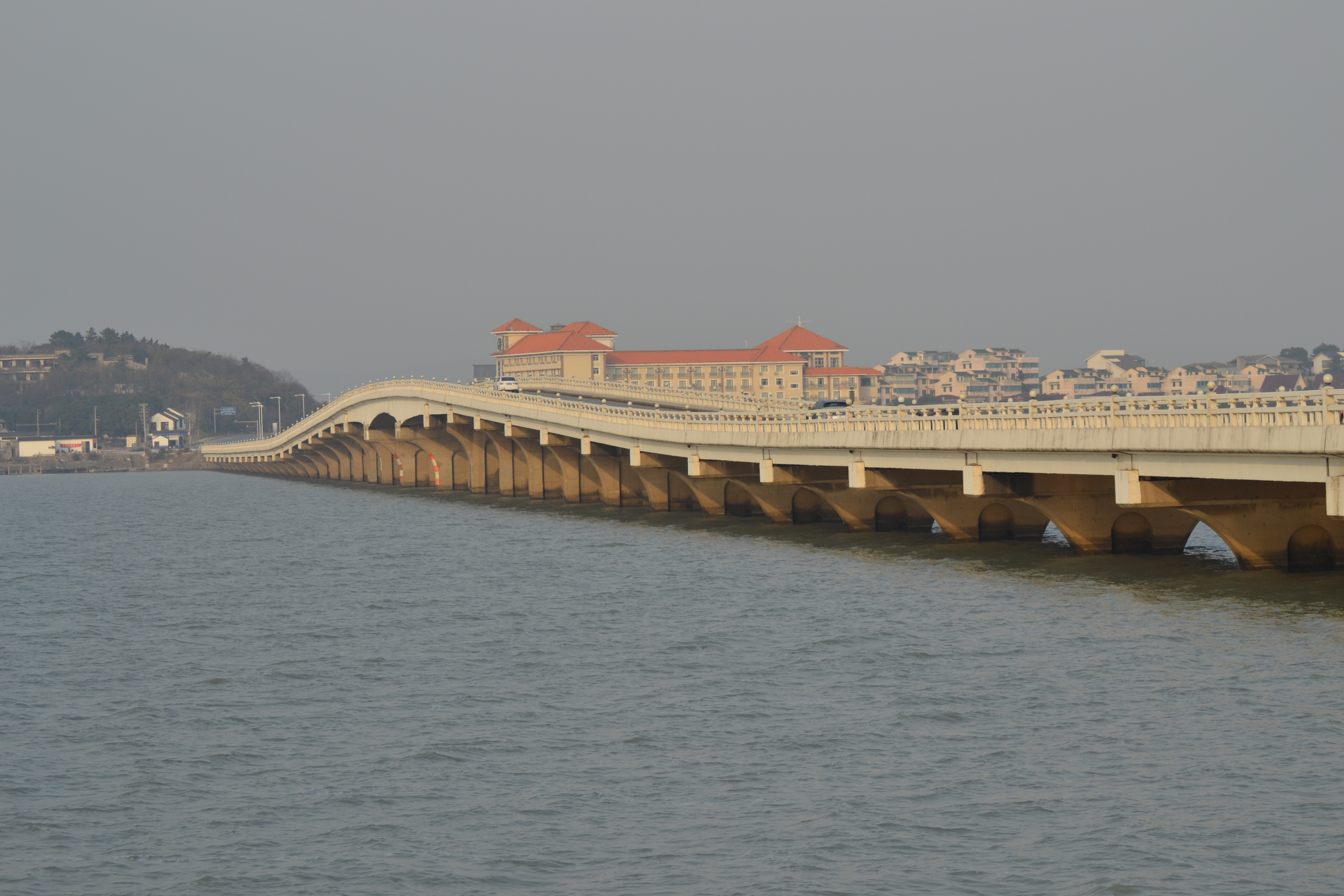 Brücke zwischen Yeshan und Xishanzhen